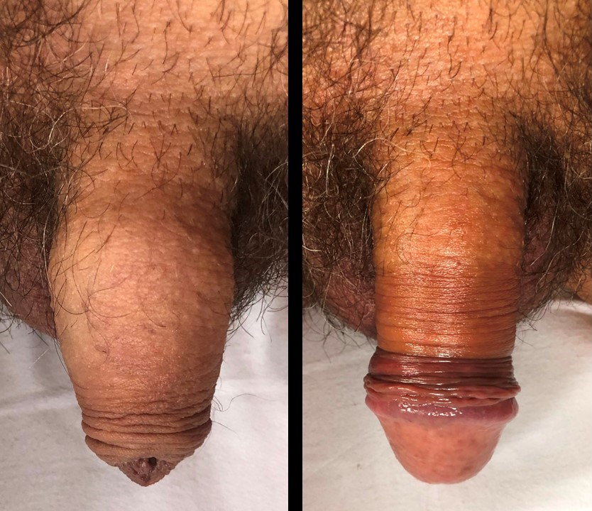 Prepucio en pene flácido adulto sano, intacto, 60 años, muestra las 2 fases básicas cotidianas. Se aprecia claro las diferentes texturas y cambios de tono de color en cada subparte. Varón de 60 años de edad, con ADN con estimado étnico 33% español, 28% portugués, 10% francés, 21% indígena americano y 8% de otros.